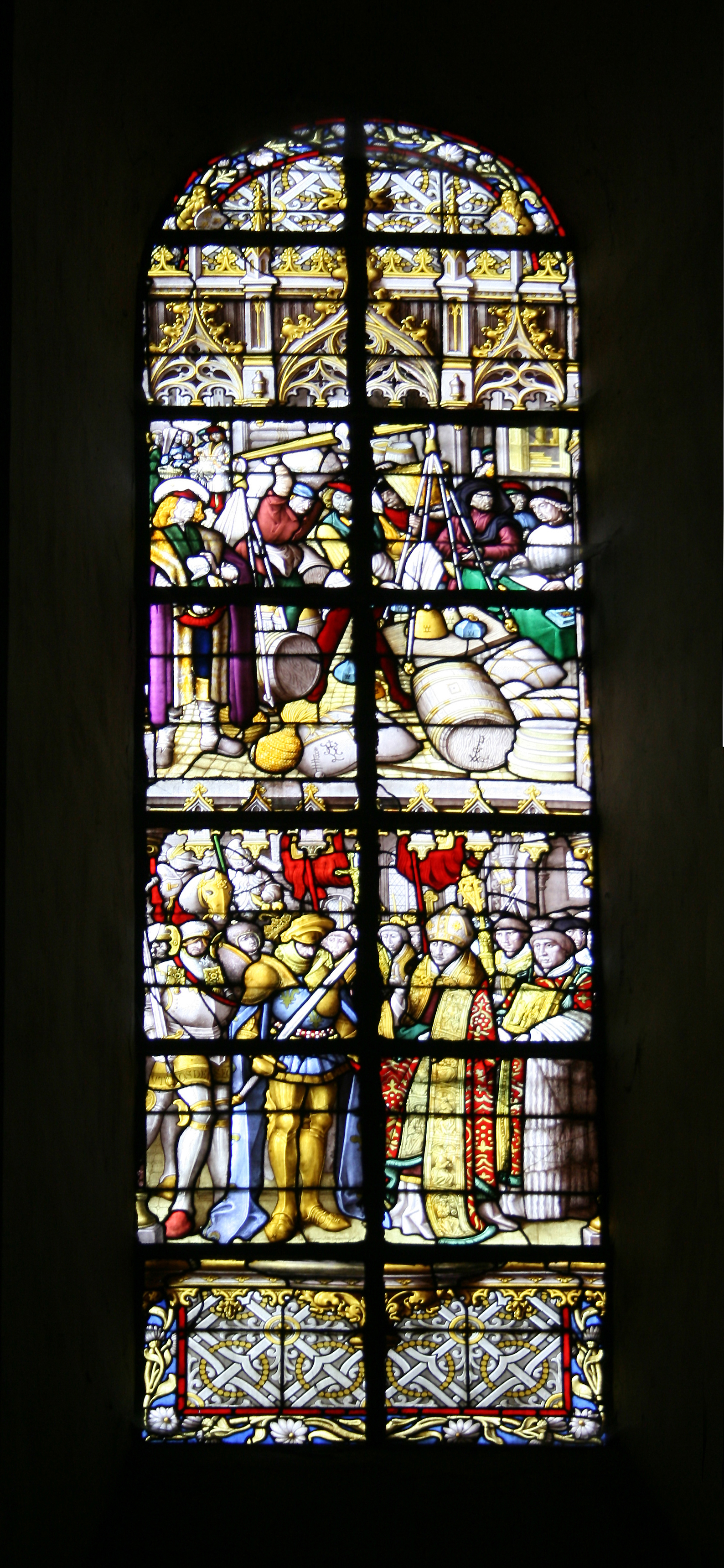 Tournai (Belgique), vitrail (XVIe siècle) du transep sud de la cathédrale Nodre-Dame, dont la partie haute représente le pivilège de la taxe sur la pesée des ballots de marchandises, et la partie basse le roi mérovingien Chilpéric II octroyant les droits de taxes en ville à l’évêque de Tournai et à son Chapitre.